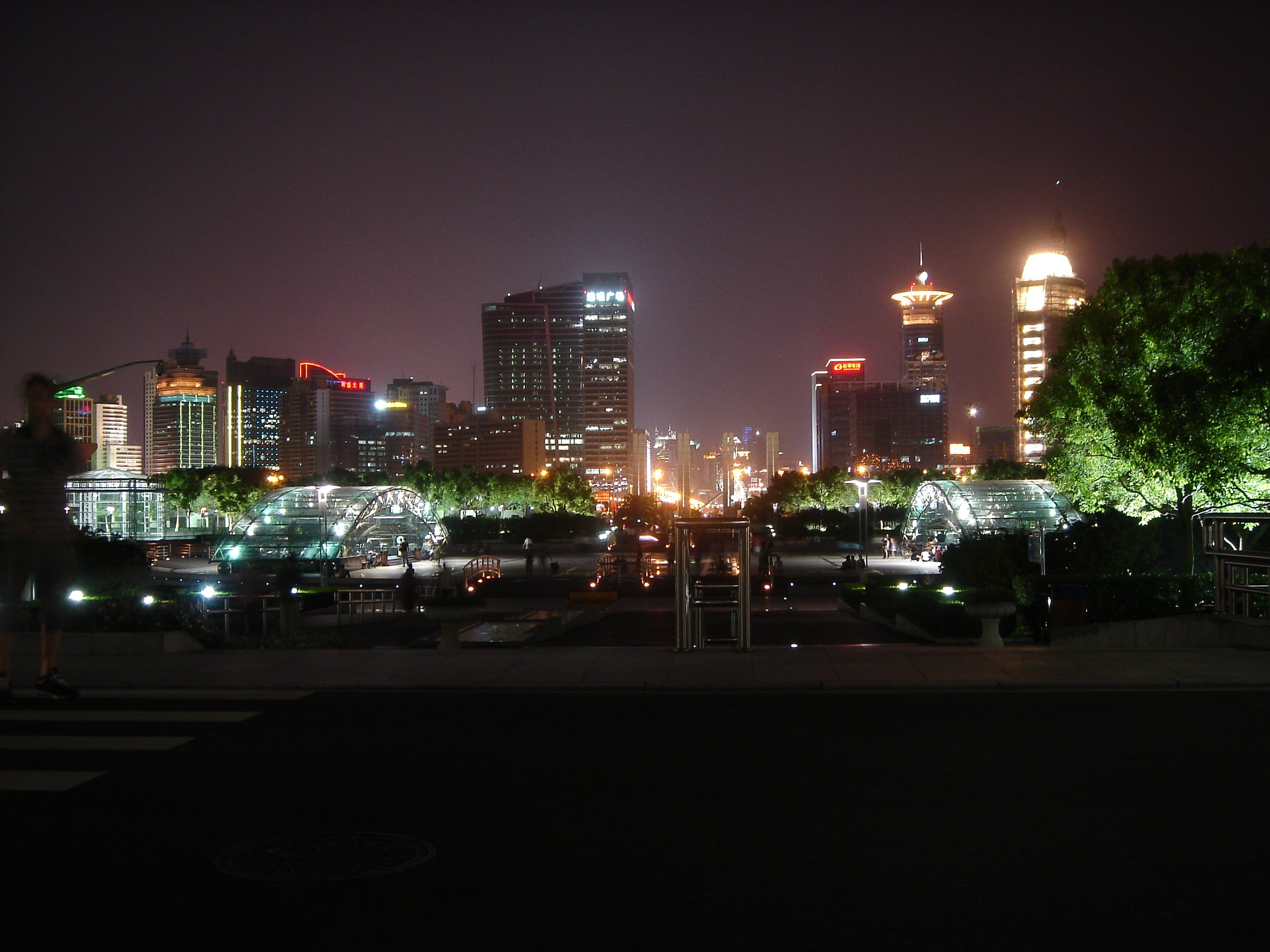 View from the Shanghai Science and Technology Museum